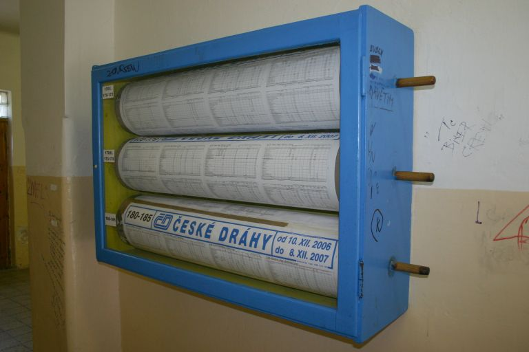 Rollenfahrplan im Bahnhof Tachov